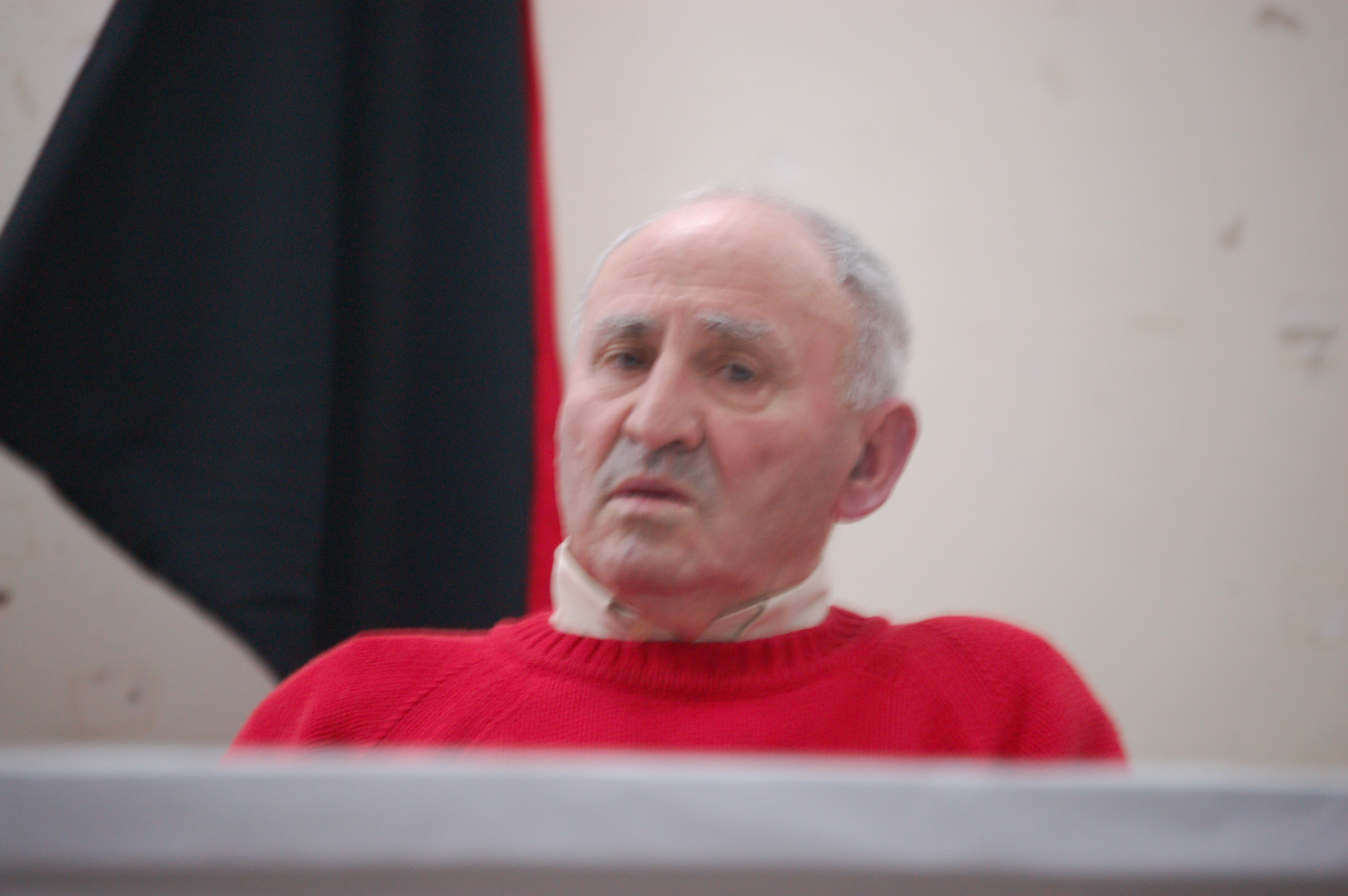 Lucio Urtubia nunha palestra en Pontevedra Categoría:Imaxes de persoas